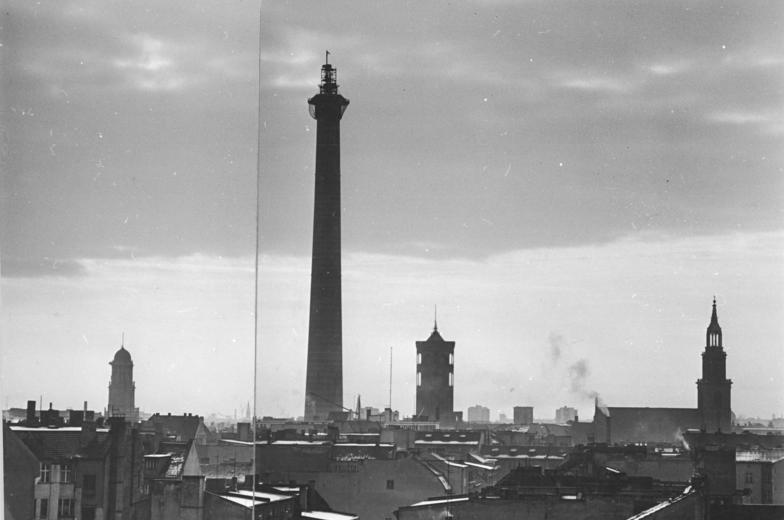 Zentralbild Koard 2.12.1966 Berlin: Die Silhouette Berlins wird bereits jetzt von dem noch im Bau befindlichen Fernsehturm geprägt. Das neue Wahrzeichen der Hauptstadt hatte am 2.12.1966 die stattliche Höhe von 170,20 Meter erreicht.